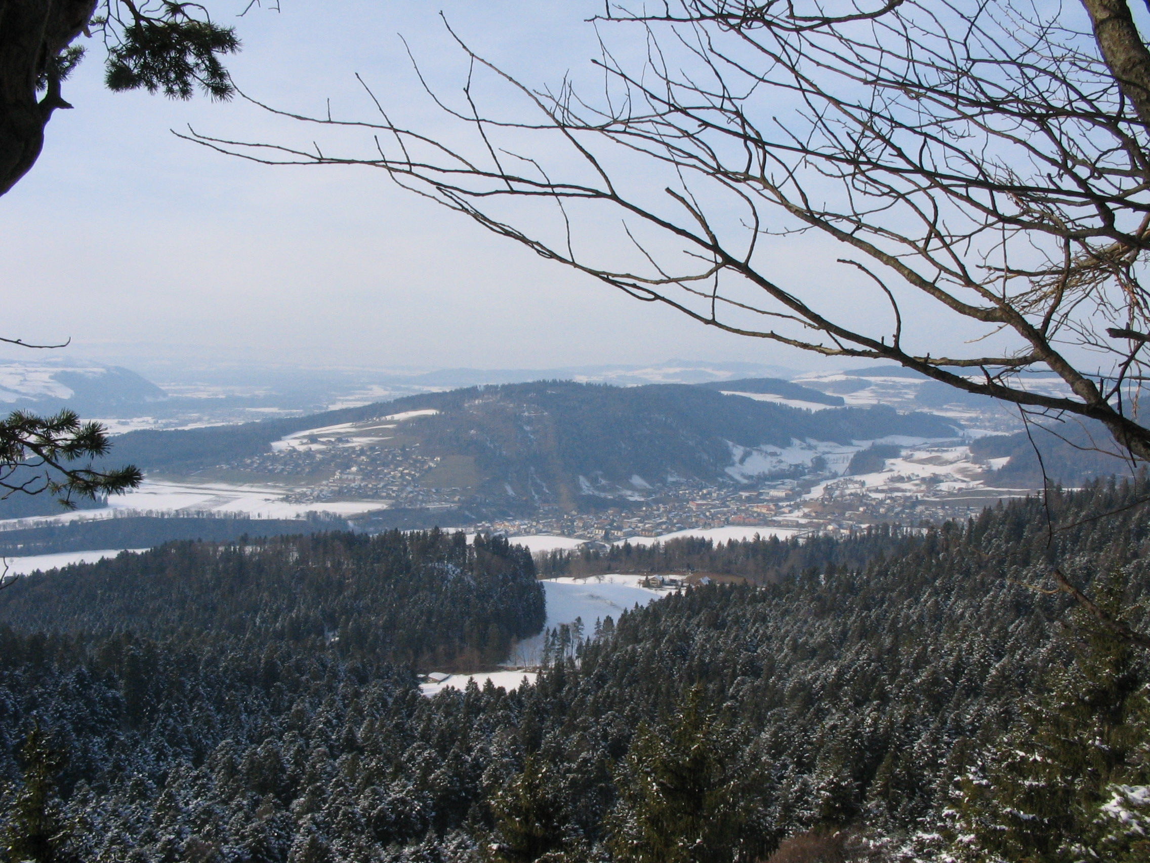 Oberdiessbach